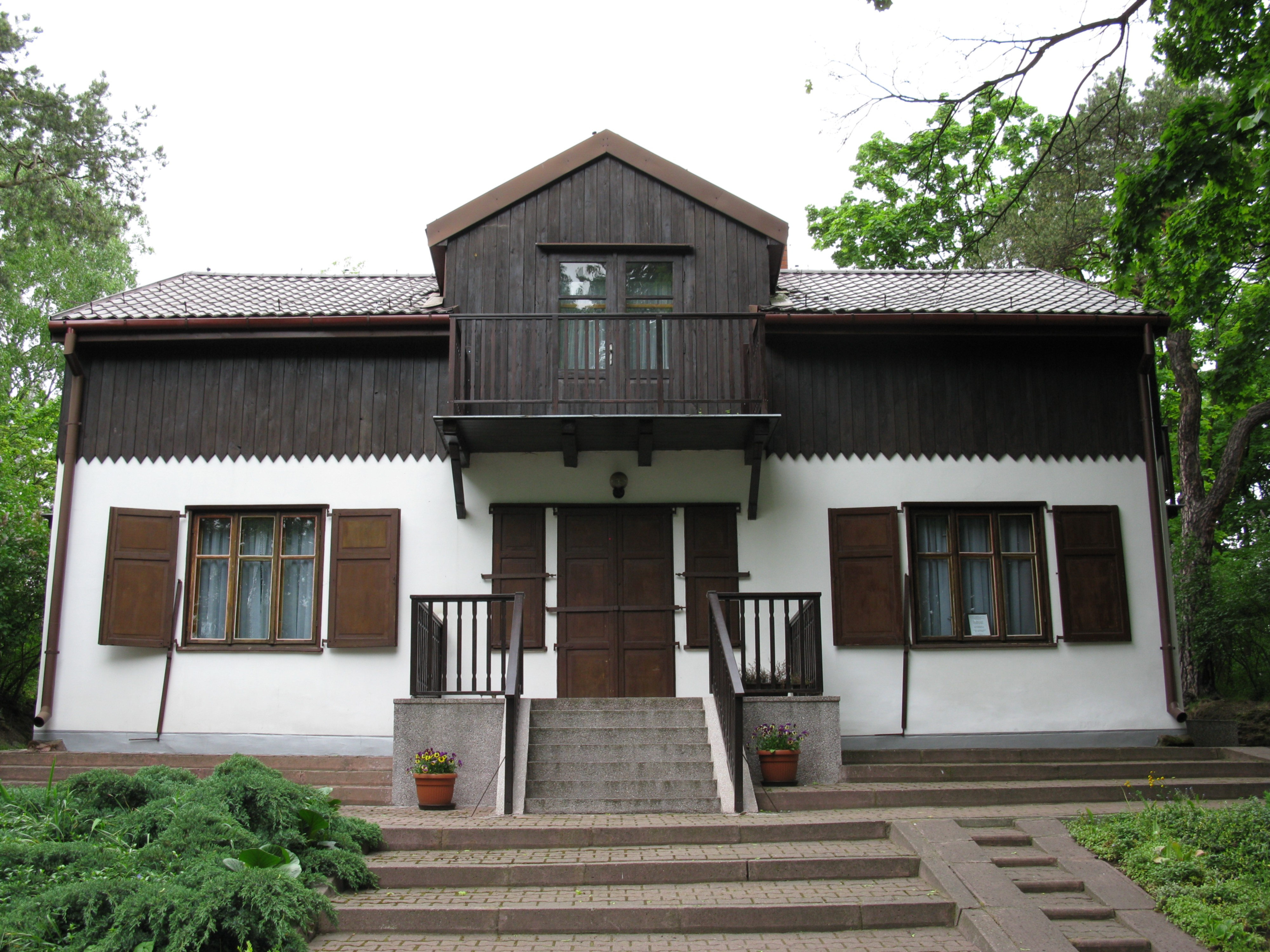 Dom nad Łąkami of Zofia Nałkowska in Wołomin